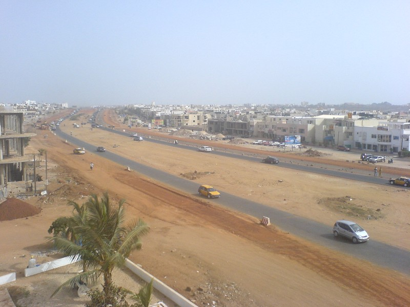 La VDN (Voie de dégagement nord) à Dakar, Sénégal